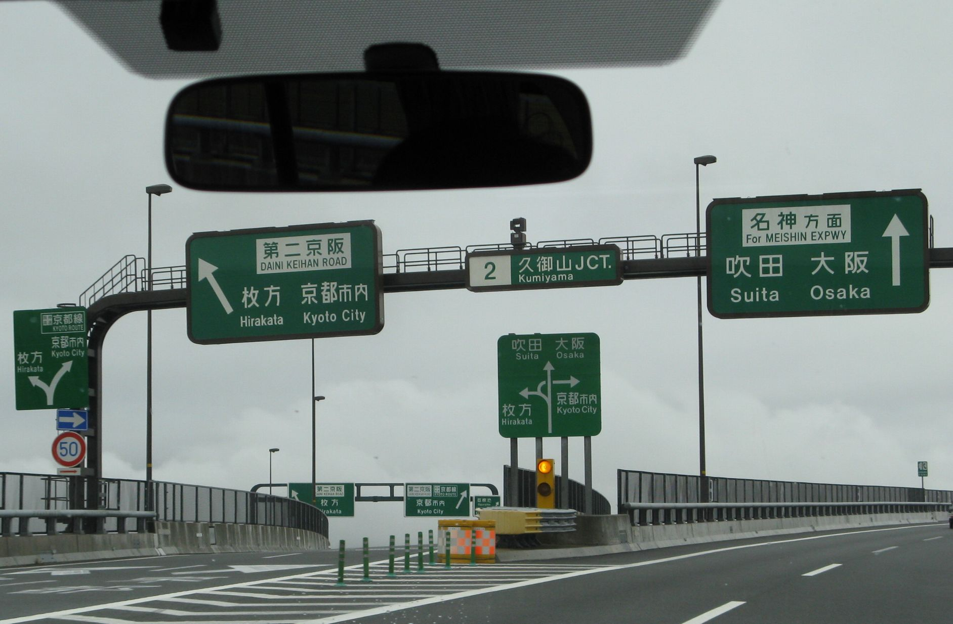 久御山ジャンクション 西行き車線から第二京阪方面への分岐を望む